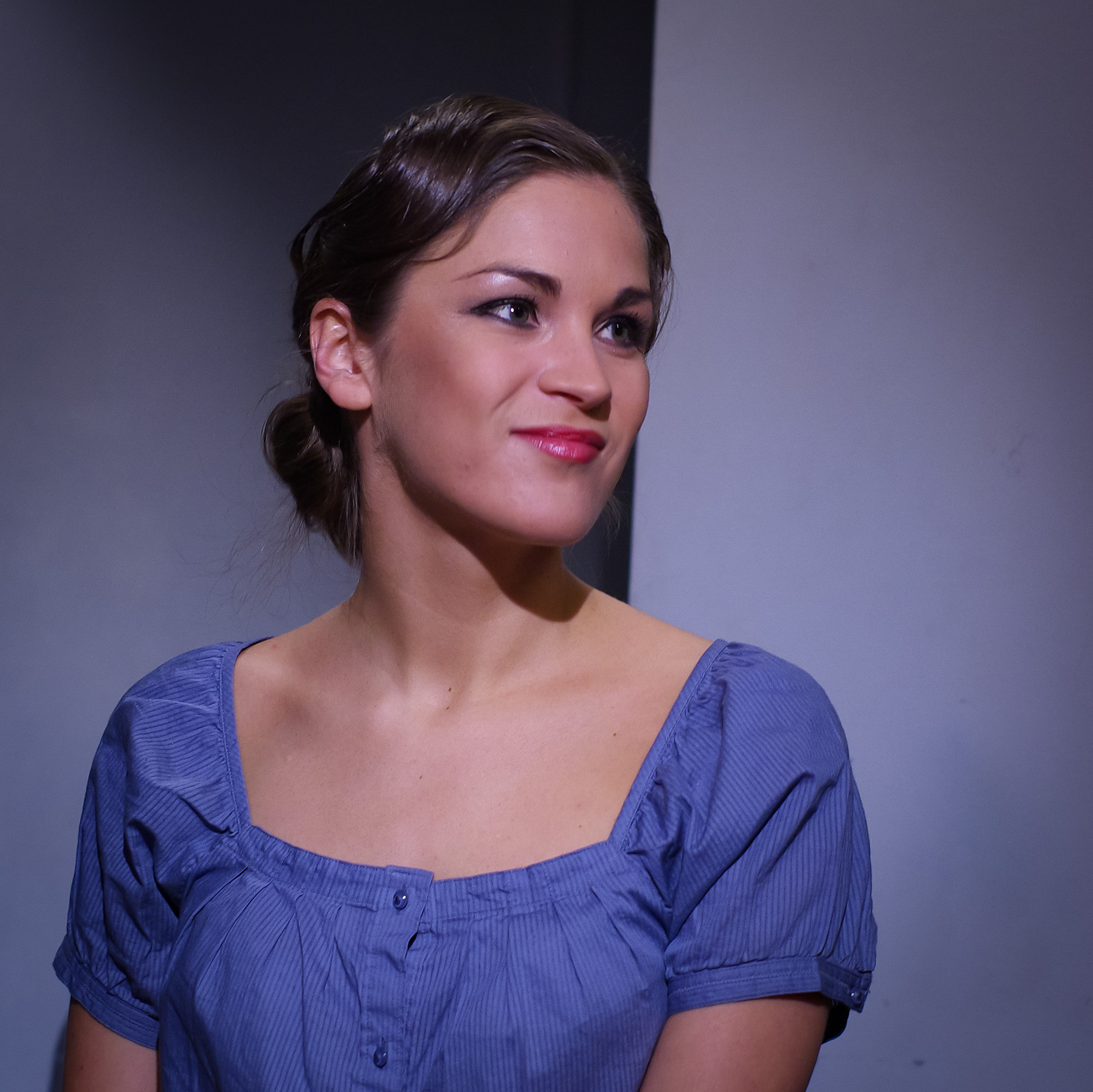 Dailes teātra aktrise Ilze Ķuzule-Skrastiņa